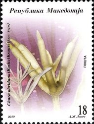 Chara ohridana